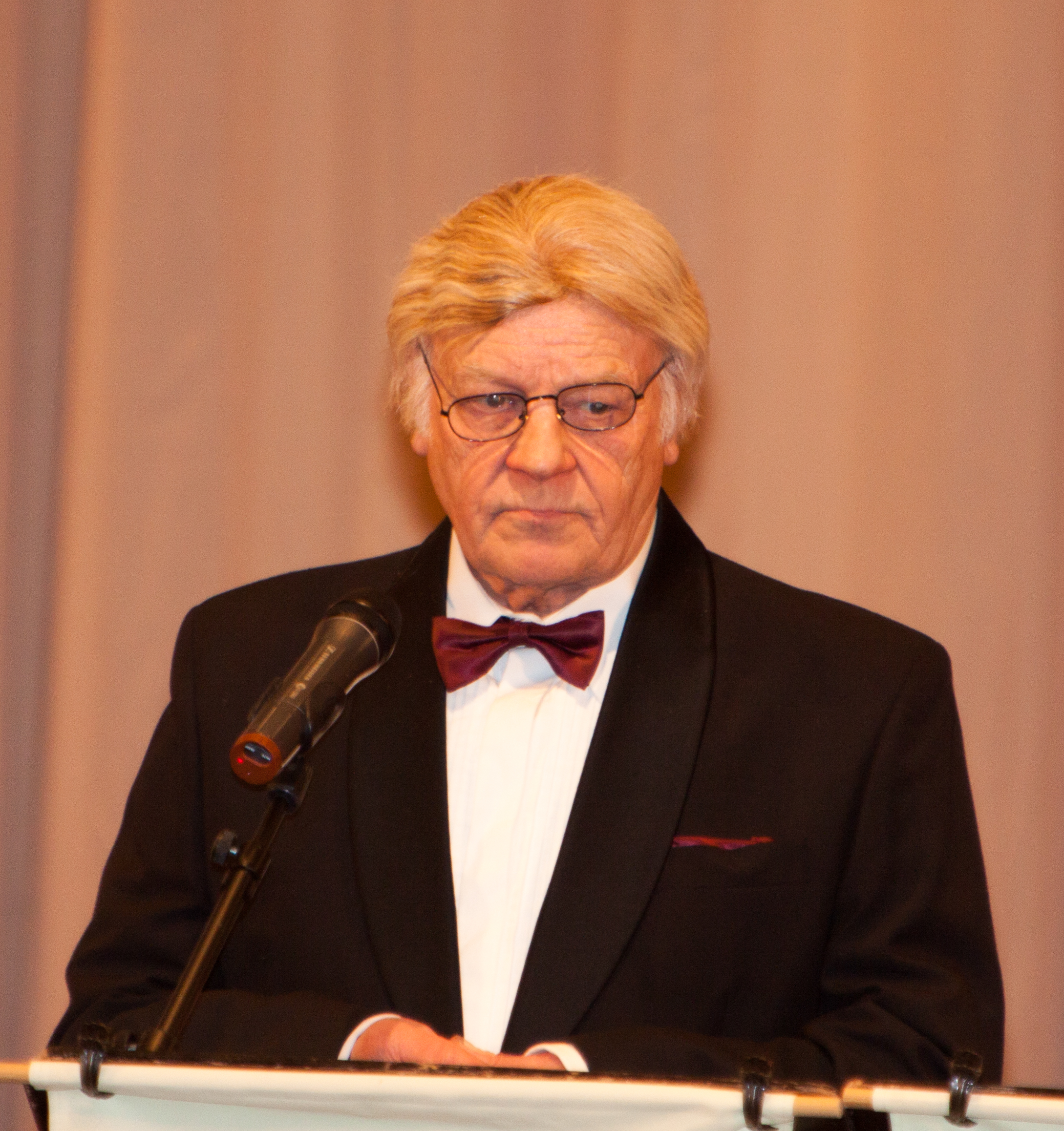 Aulis Kotaviita suomalainen laulaja